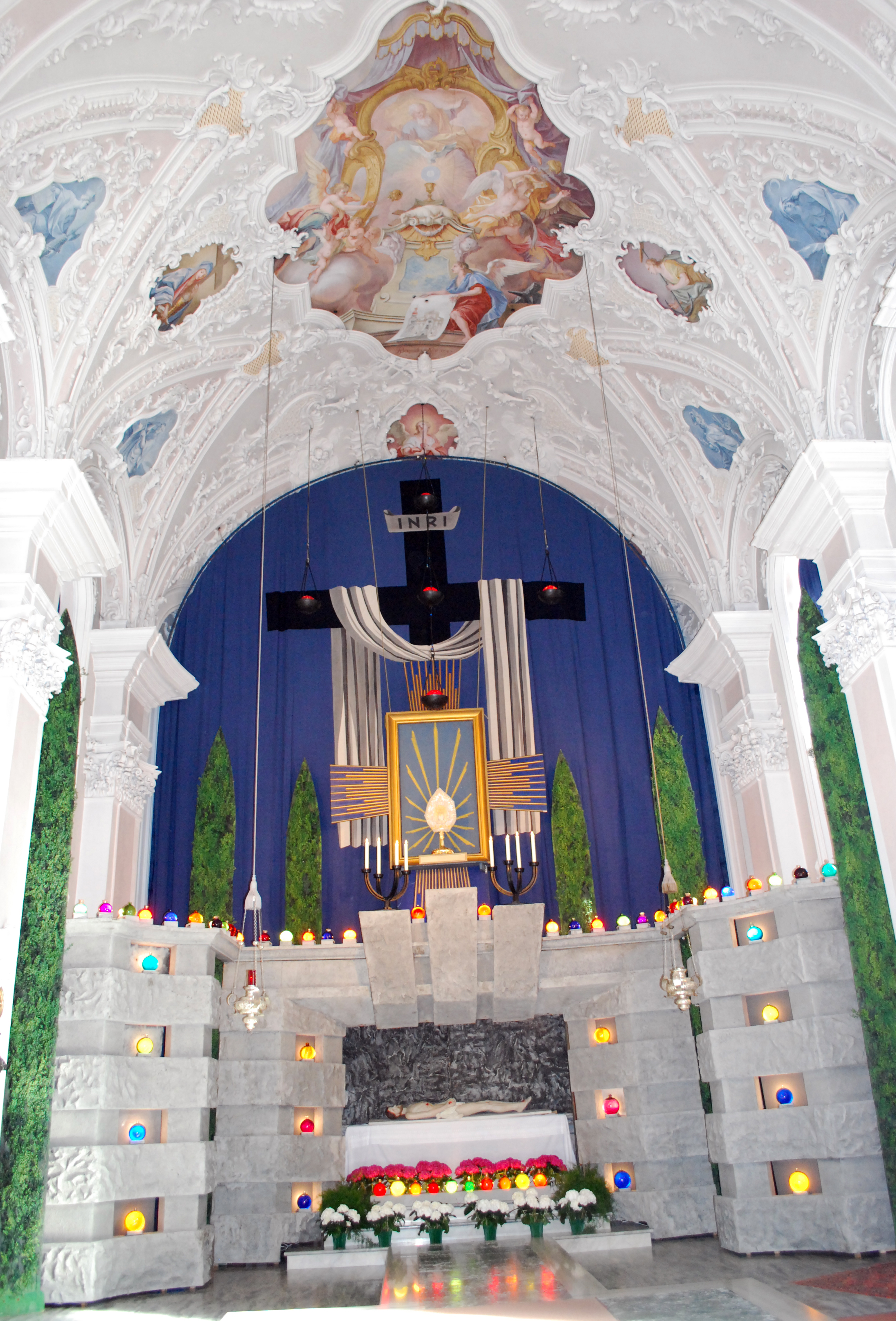 Heiliges Grab Fulpmes